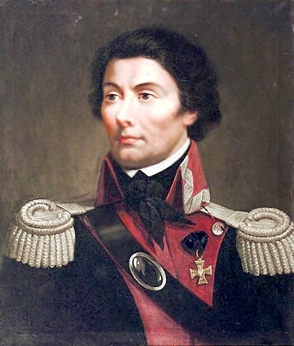 Marcin Jabłoński, "Tadeusz Kościuszko", 1827, olej na płótnie, 55,5 x 47,5 cm, własność prywatna